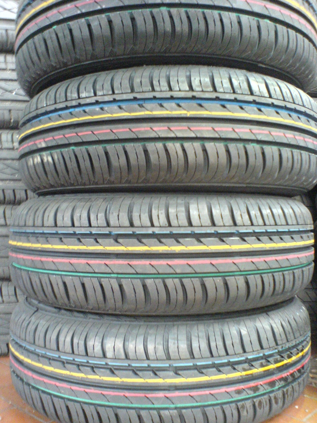 Gestapelte Autoreifen mit farbigen Markierungen